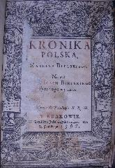 Kronika Polska Marcina Bielskiego